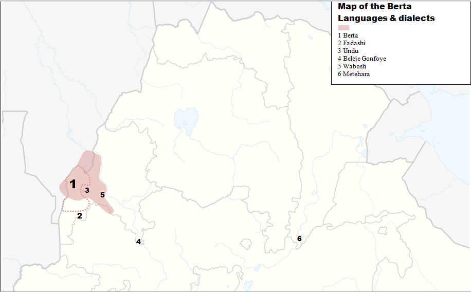 Map of the Berta Languages